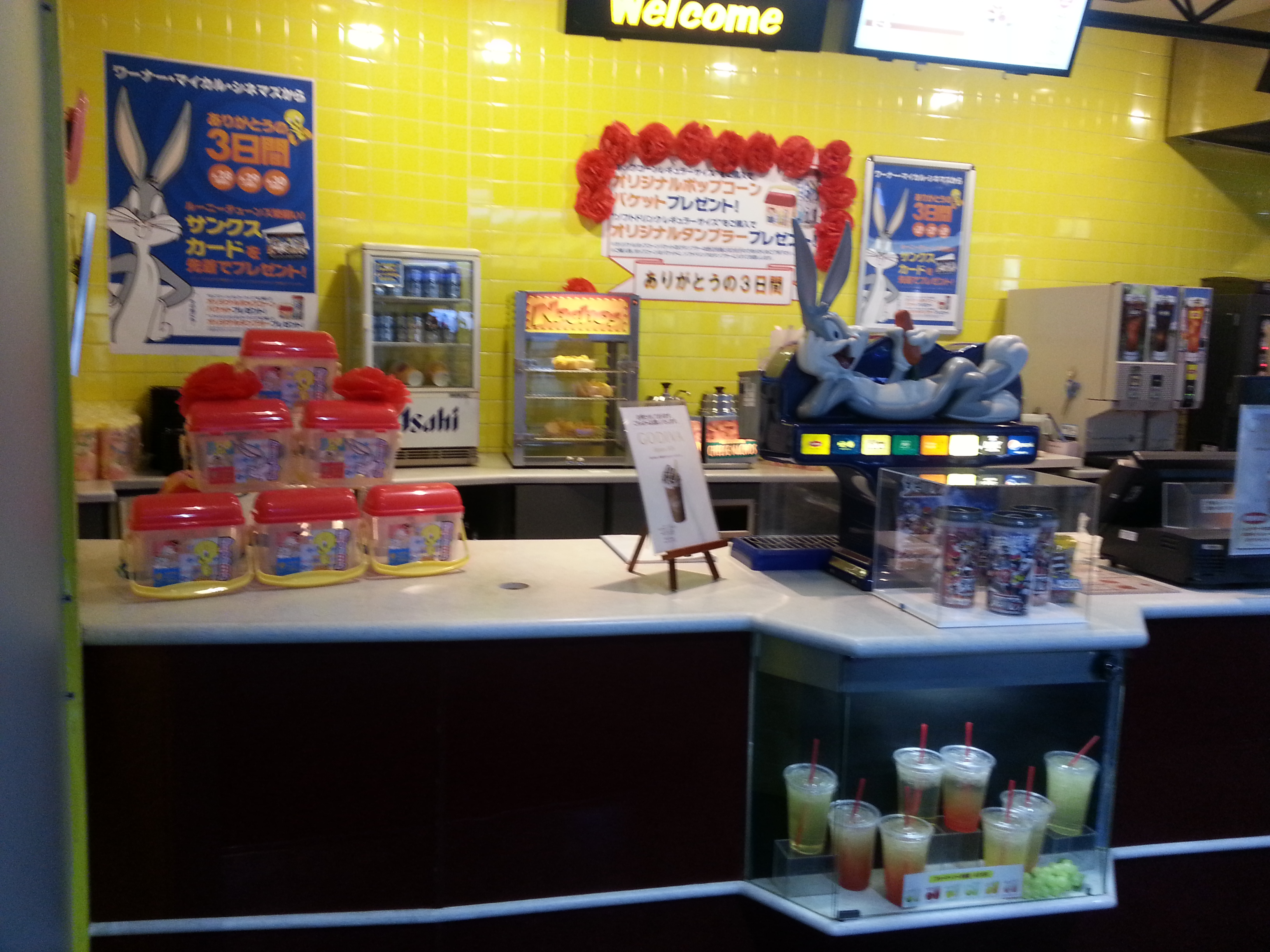 ワーナー・マイカル・シネマズ海老名内にある飲食売店（2013年6月28日）。なお、2013年7月より映画館名がイオンシネマ海老名に変更されている。